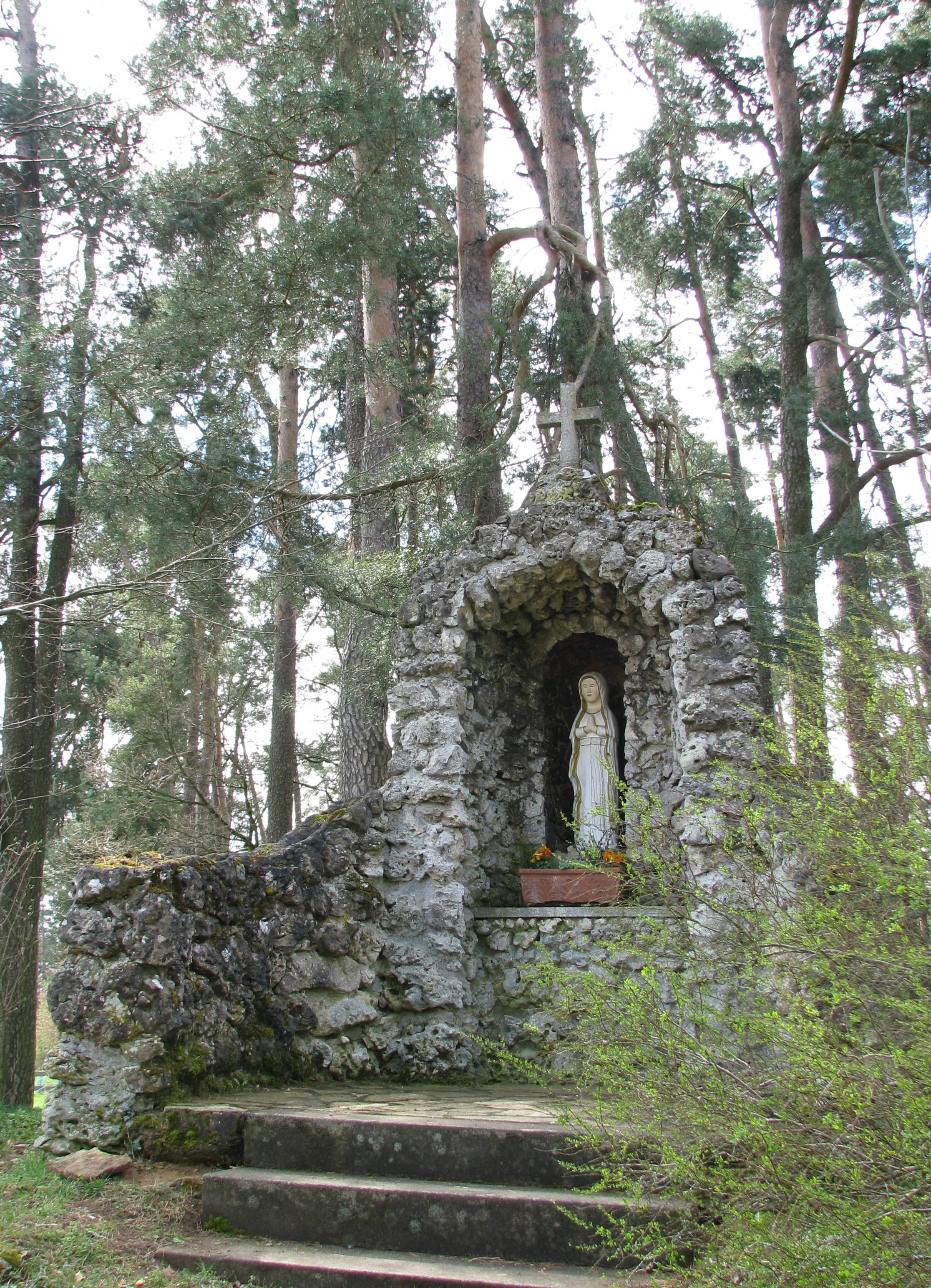 Möningerberg bei Möning, Ortsteil von Freystadt im Landkreis Neumarkt in der Oberpfalz, Grotte bei der 14-Nothelfer-Kapelle von 1884